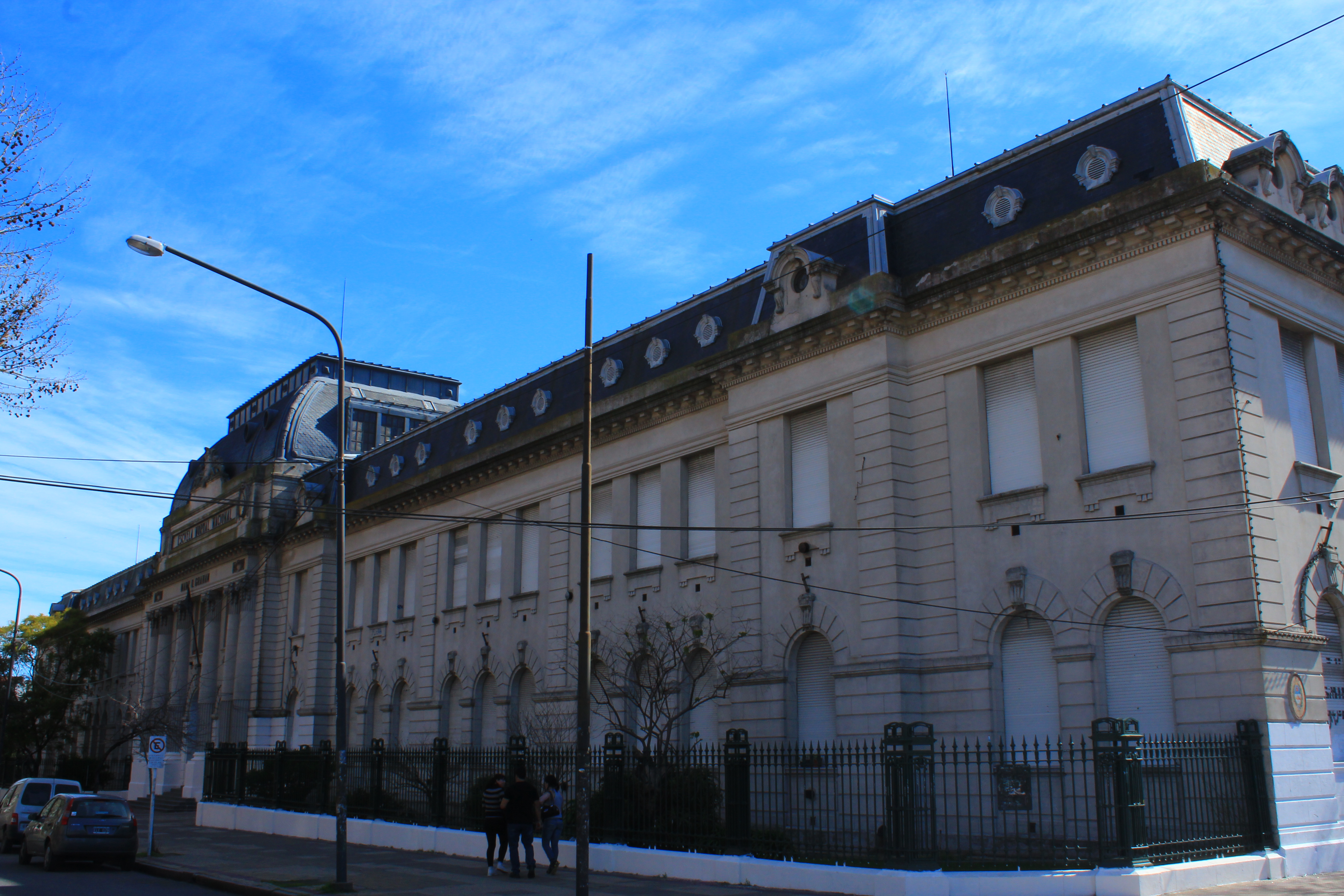 Escuela Normal N.º 1 "Mary O'Graham"